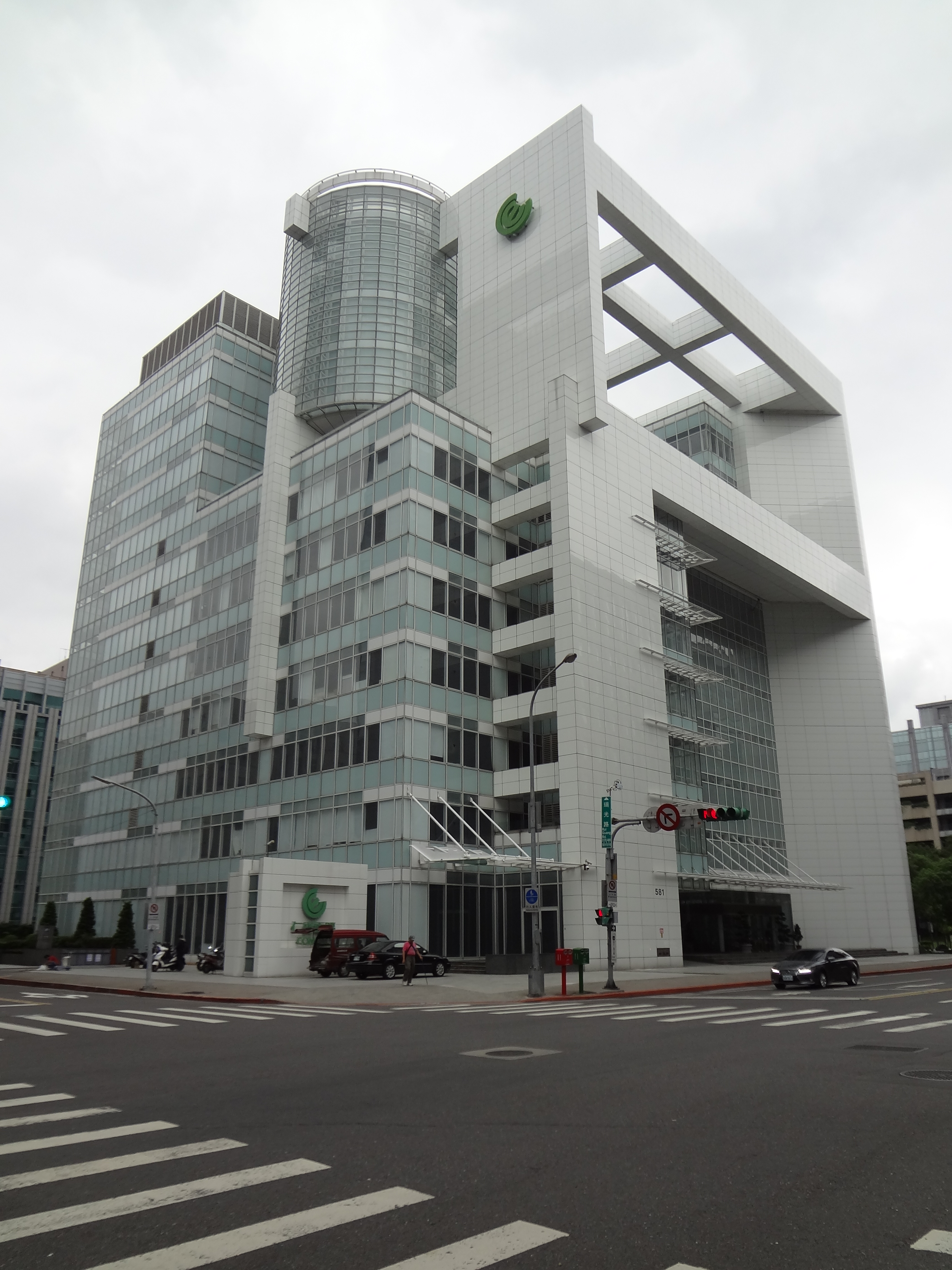 仁寶電腦台北辦公室，是仁寶電腦總部所在地，地址：臺北市內湖區瑞光路581、581之1號。